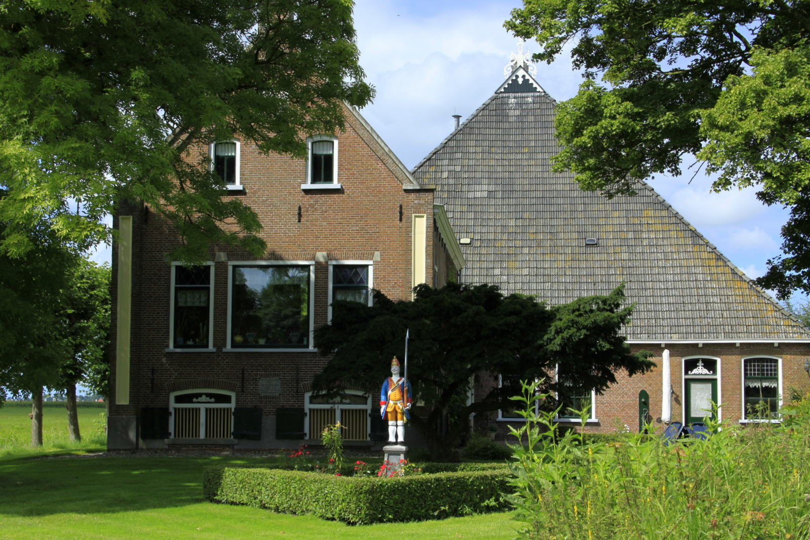 De Museum boerderij Barrahûs aan de Brédyk in Wirdum gemeente Leeuwarden met het beroemde Friese soldaatje.